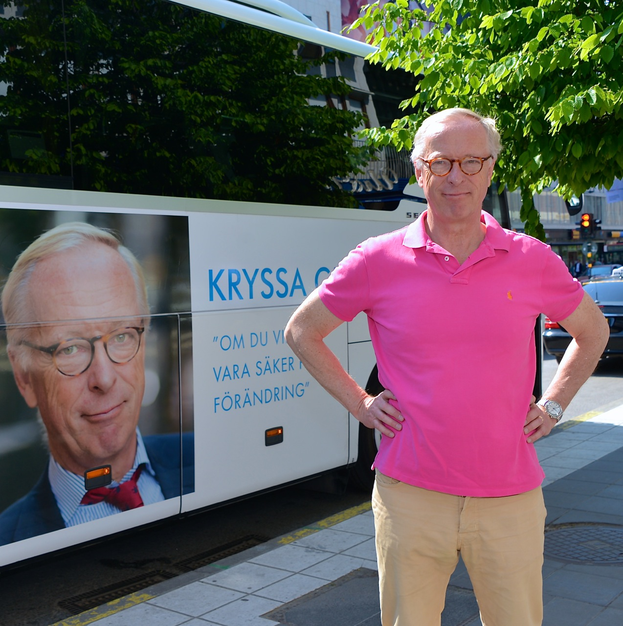 Gunnar Hökmark den 24 maj 2014 inför valet till Europaparlamentet dagen därpå.